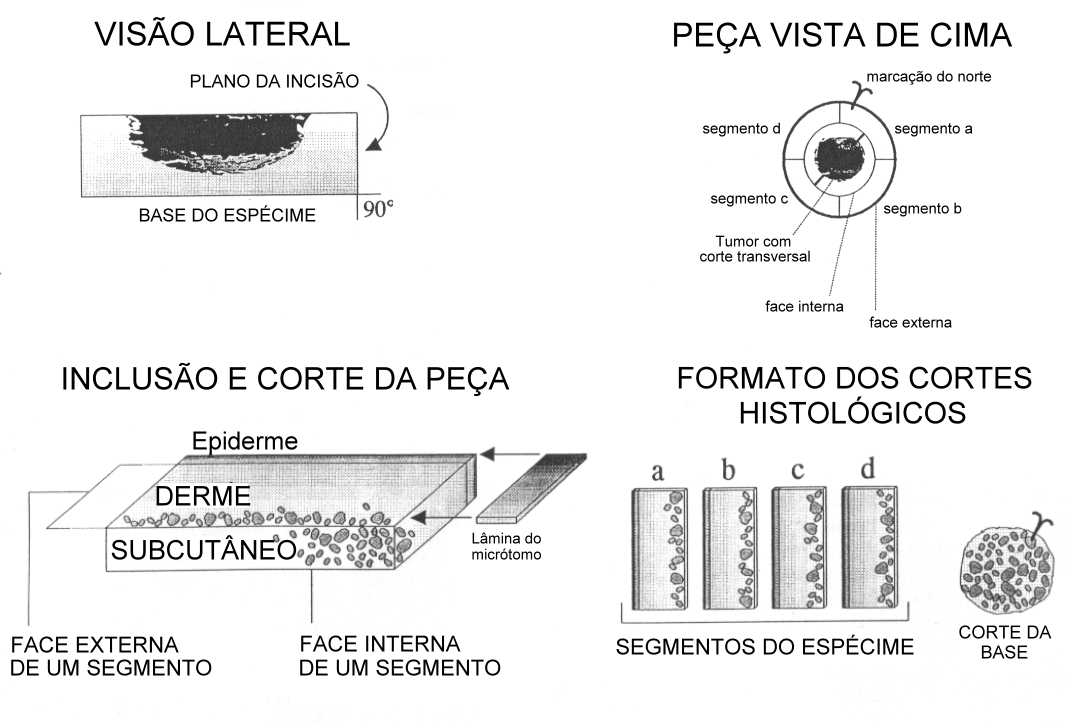 Representação esquemática da Torta de Tübingen de cirurgia micrográfica